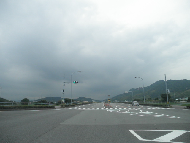 徳島県阿南市見能林町林崎 国道55号阿南道路